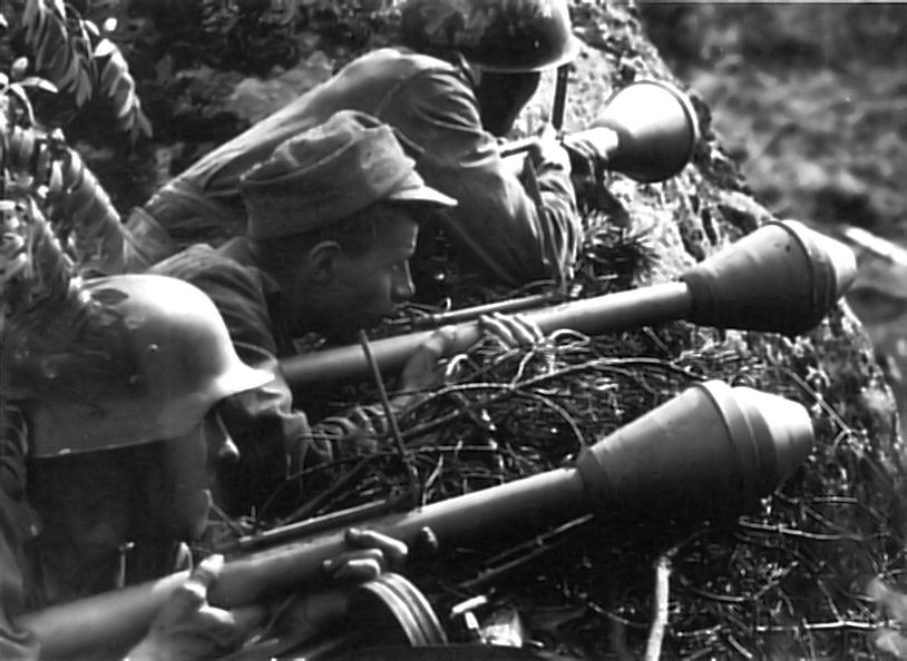 Neuvostoliiton suurhyökkäyksen torjunnassa käytettyjä panssarinyrkkejä tuliasemassa.